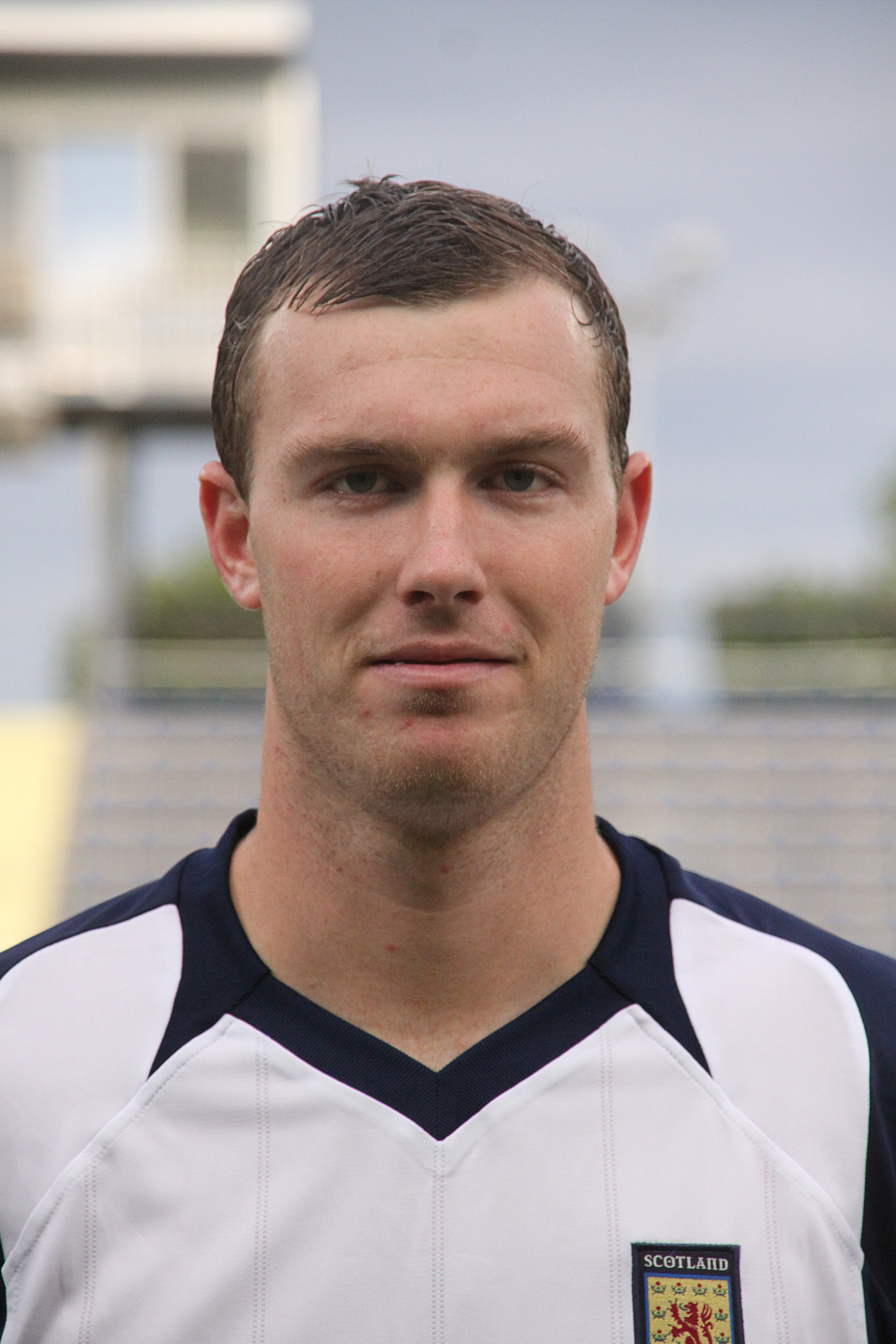 Kevin McDonald (FC Burnley) - Schottische Fußballnationalmannschaft (U-21-Männer) Kevin McDonald (Burnley F.C.) - Scotland national under-21 football team — (1)